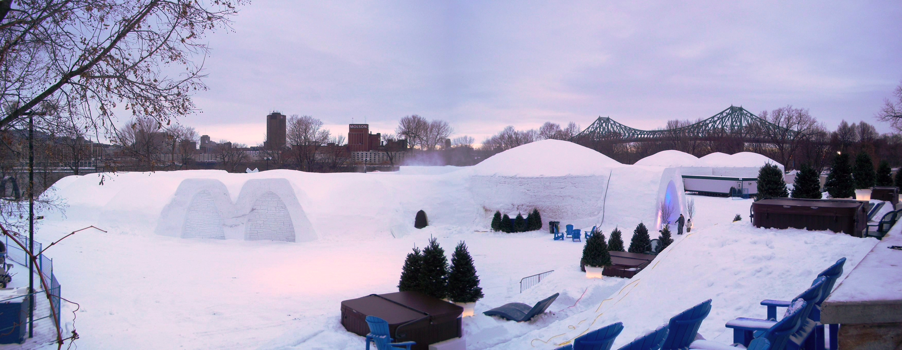 Village des neiges, Île Sainte-Hélène, Montréal